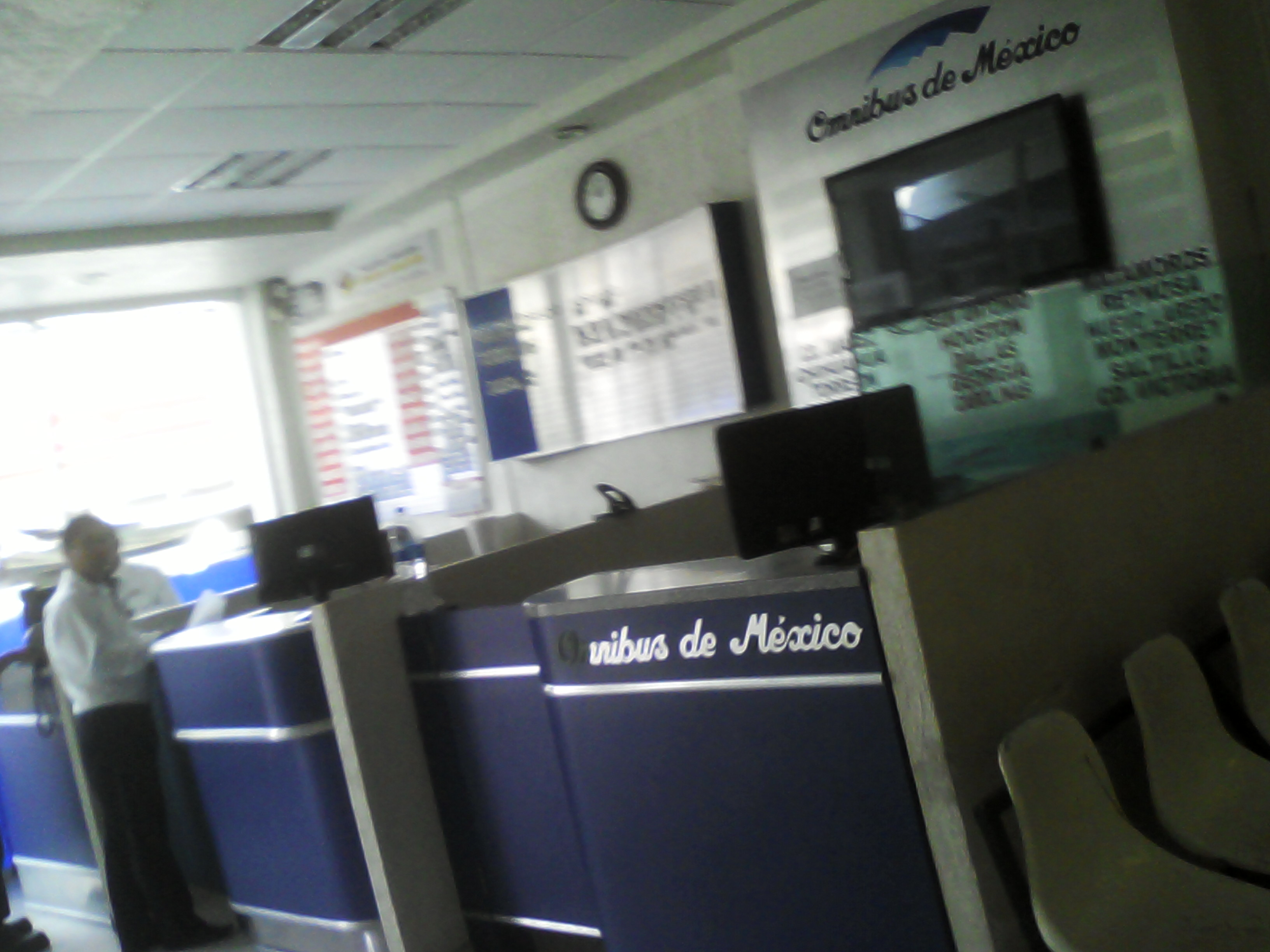 Taquillas de la termianal